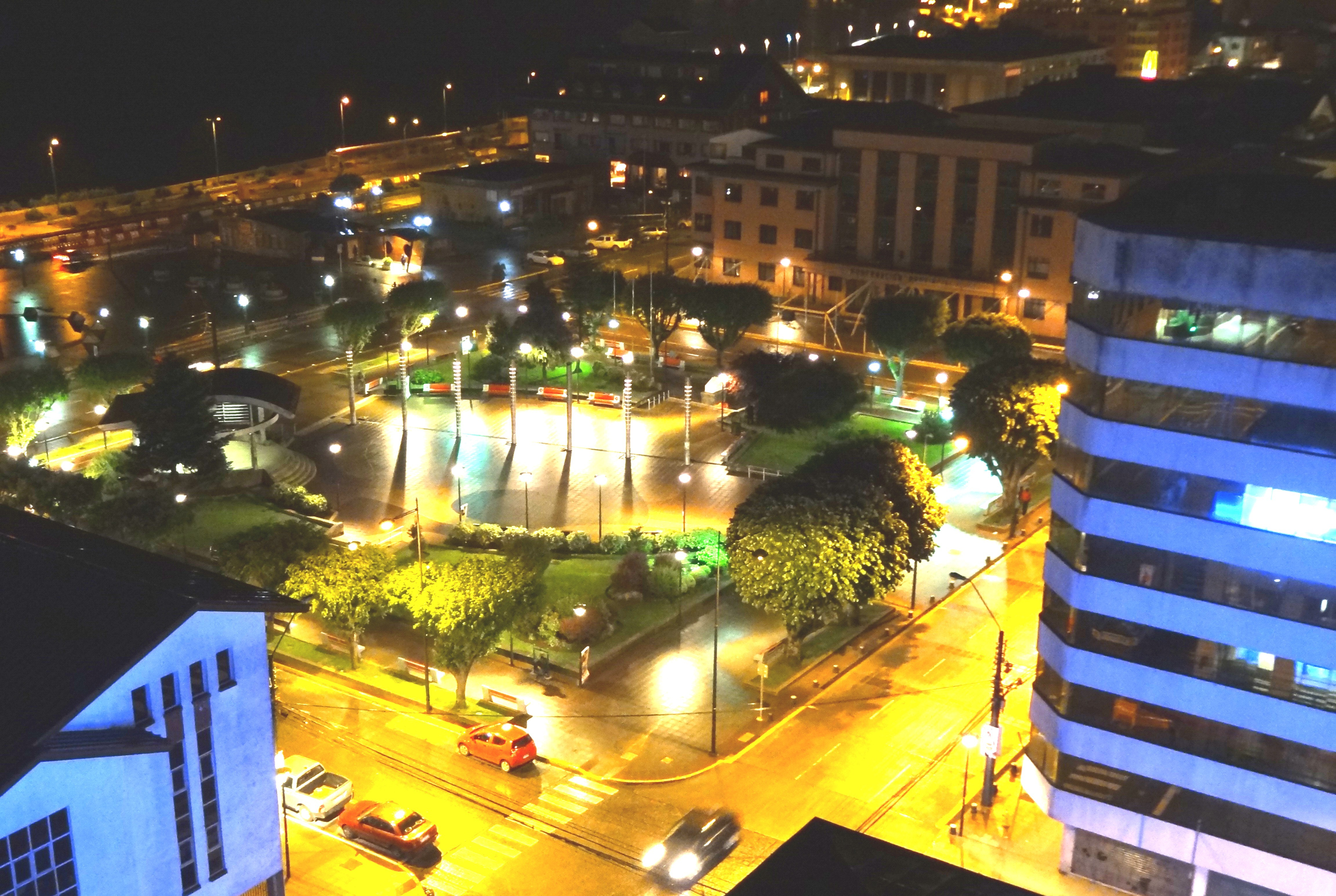 Plaza de Puerto Montt en invierno nocturno